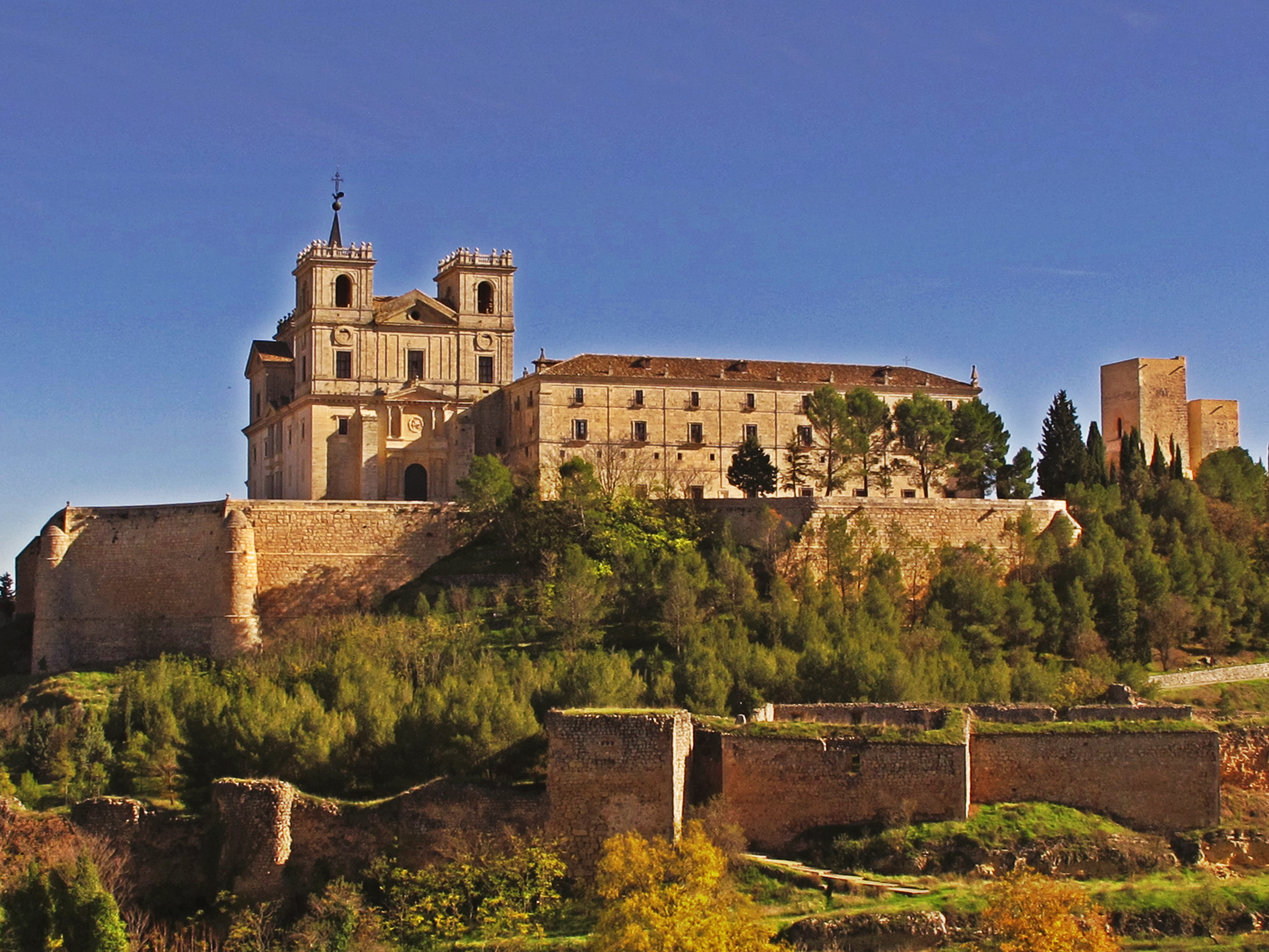 El monasterio se enclava dentro de la fortaleza de Uclés (siglo XII) que tenía una extensión de un kilómetro cuadrado rodeado de murallas En el interior del monasterio se han rodado diversas peliculas, entre ellas podemos citar los Tres Mosqueteros y la cinta española Alatriste (2005) del director español Agustin Diaz Yanes. Bic: RI-51-0000548